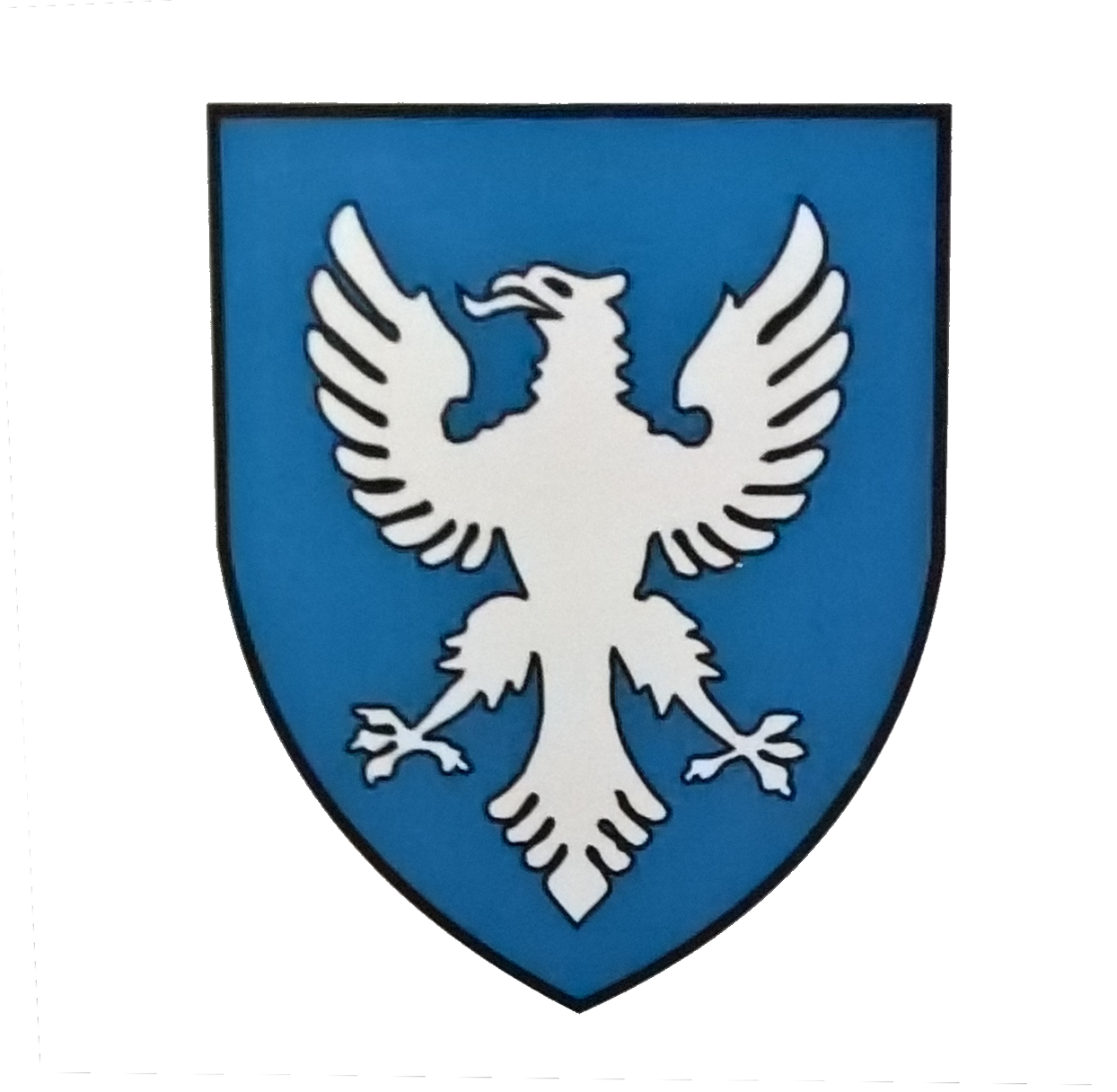 Stemma di Lekë Dukagjini